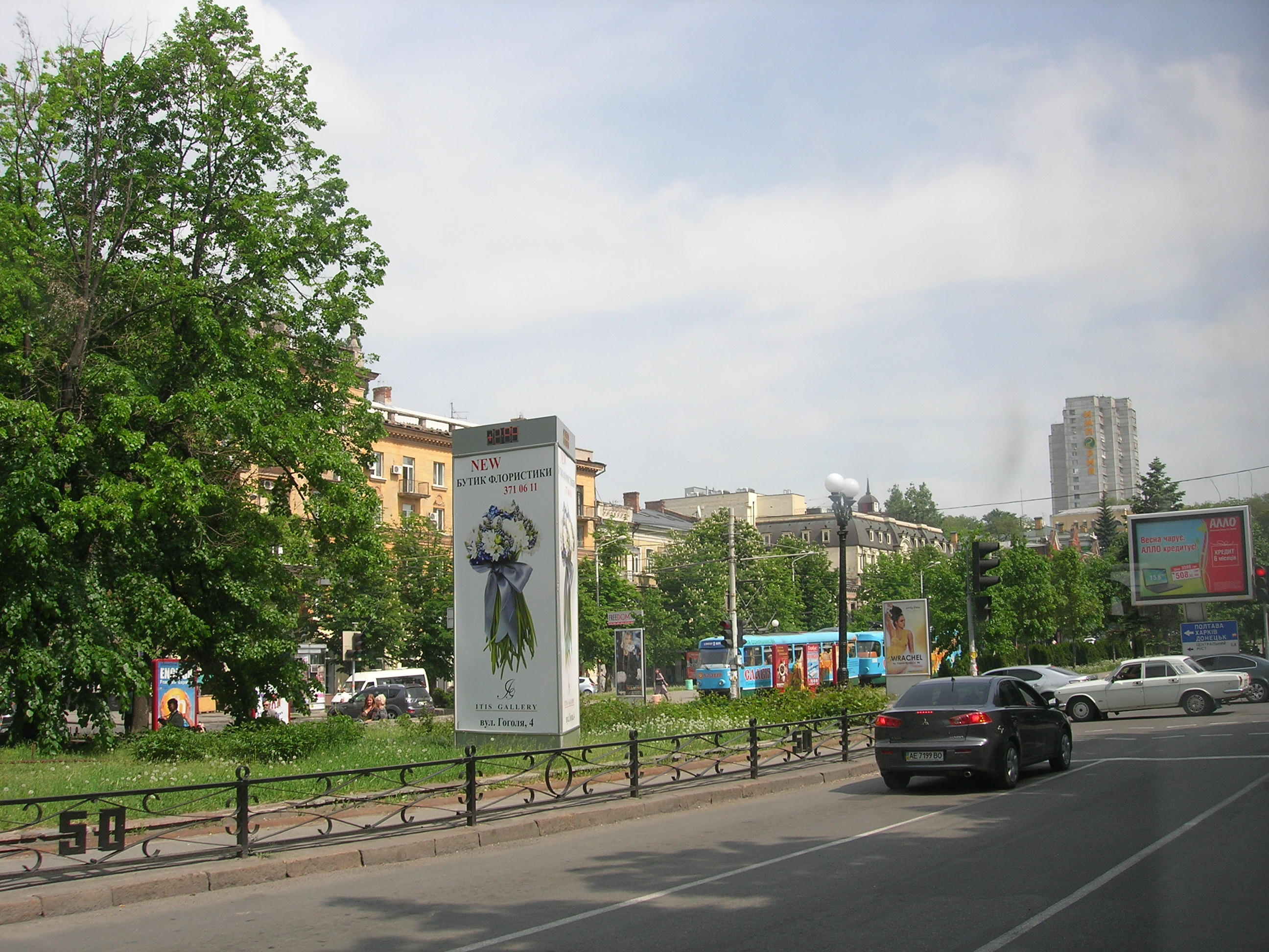 Дніпропетровськ. проспект Дмитра Яворницького